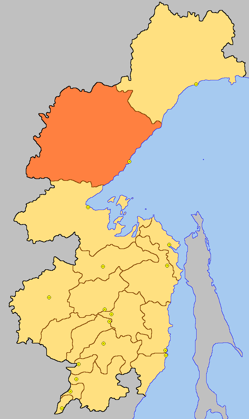 Аяно-Майский район ХК – Карта-схема